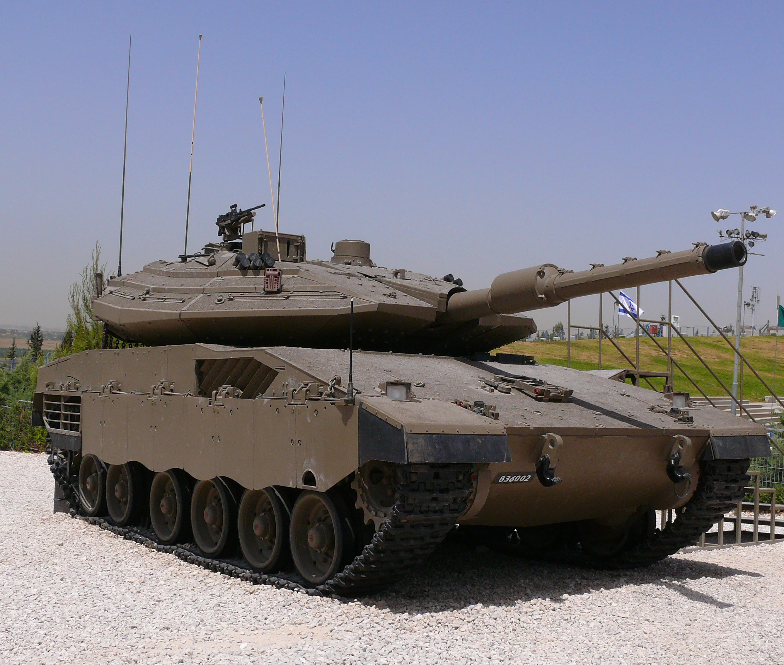 Merkava tank Mk4 in Yad LaShirion, Latrun, Israel טנק מרכבה סימן 4 ביד לשריון, לטרון, ישראל